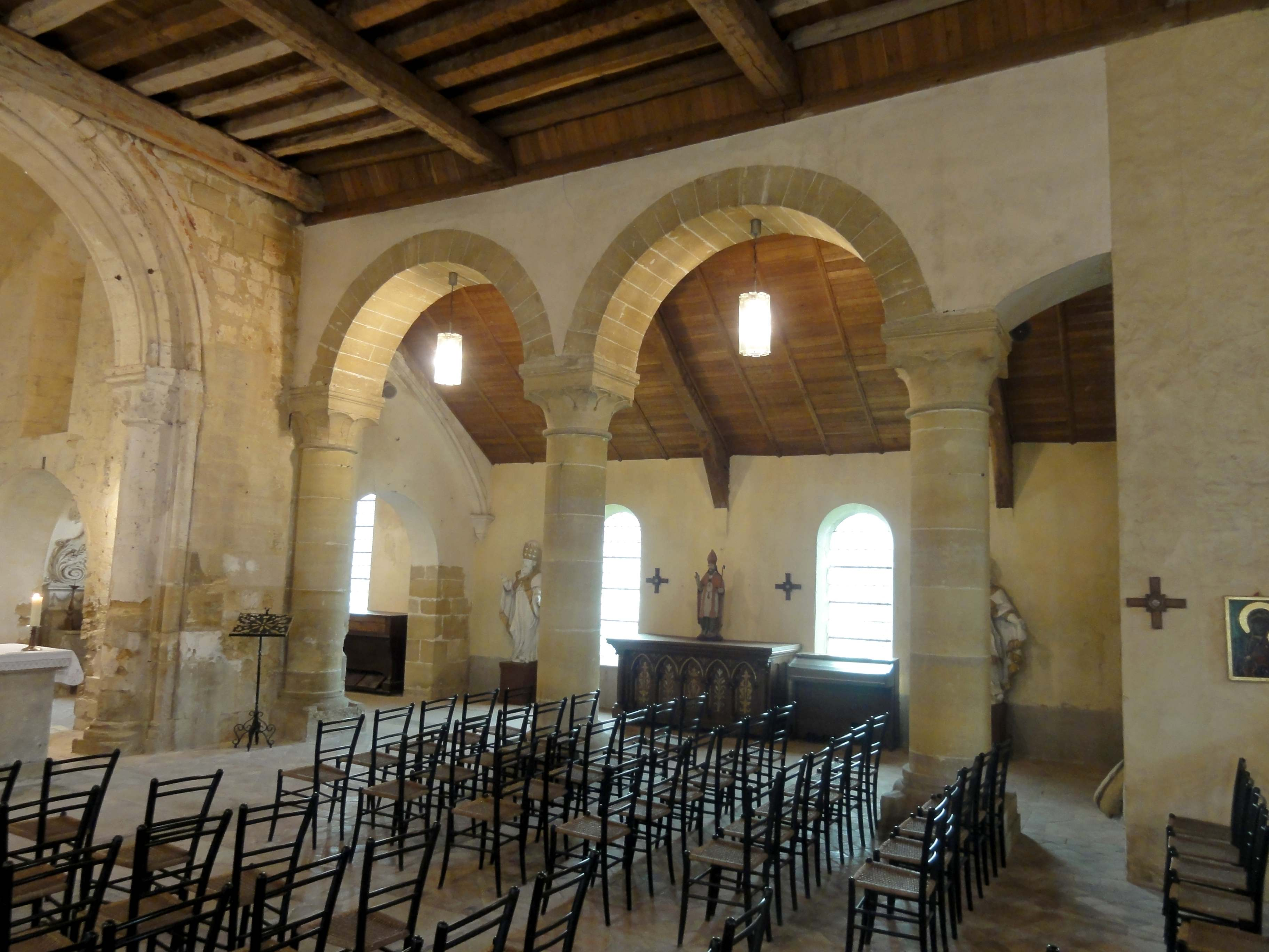 Intérieur de l'église - voir titre.